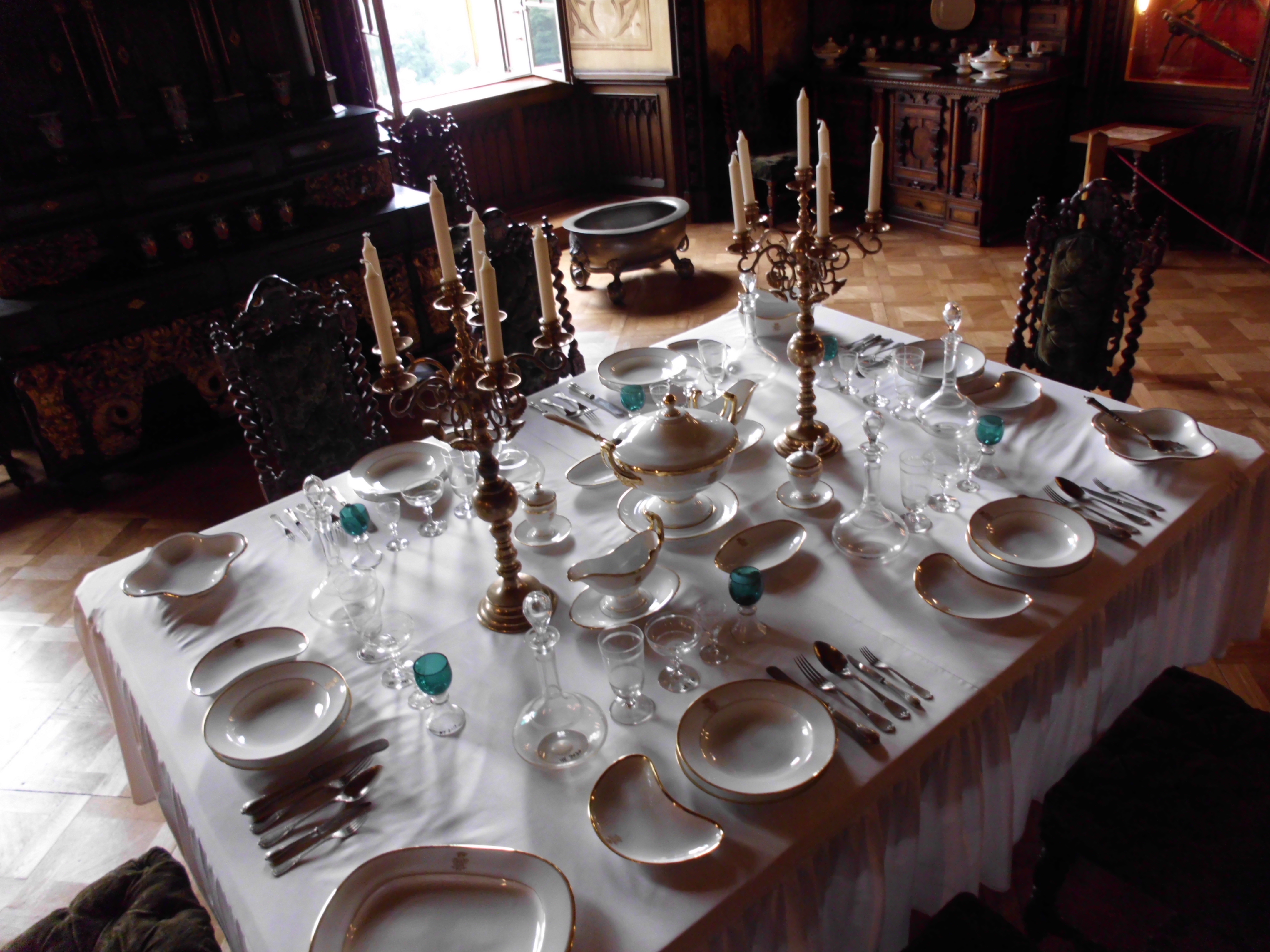 Zámek Hrubý Rohozec Turnov, Turnov 1